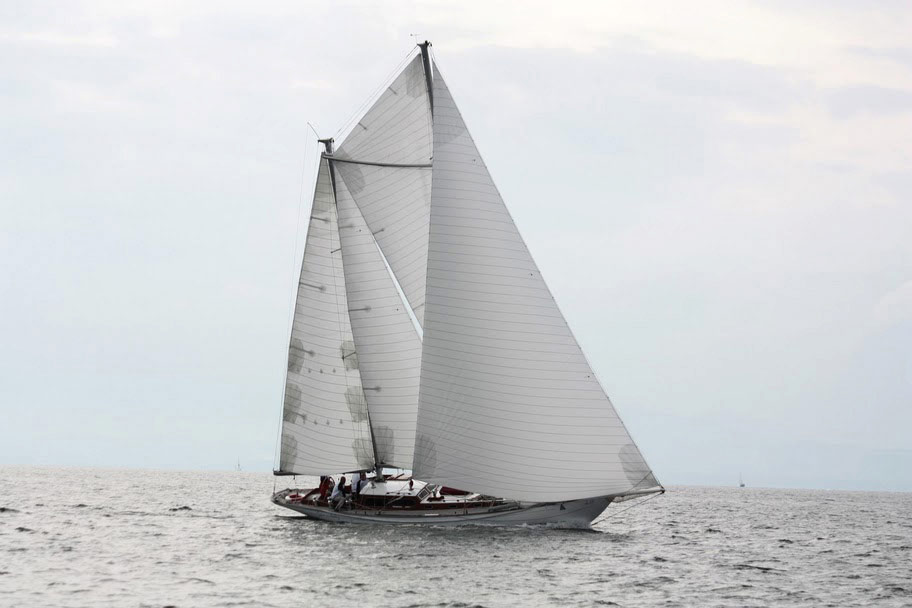 Die 1955 von Paul Böhling konstruierte und gebaute Spreizgaffel- oder Wishboneketch "Safari". Getestet im Wellenkanal, gebaut mit dem ersten deutschen Alu-Rigg. Heute unterwegs in der Ostsee.